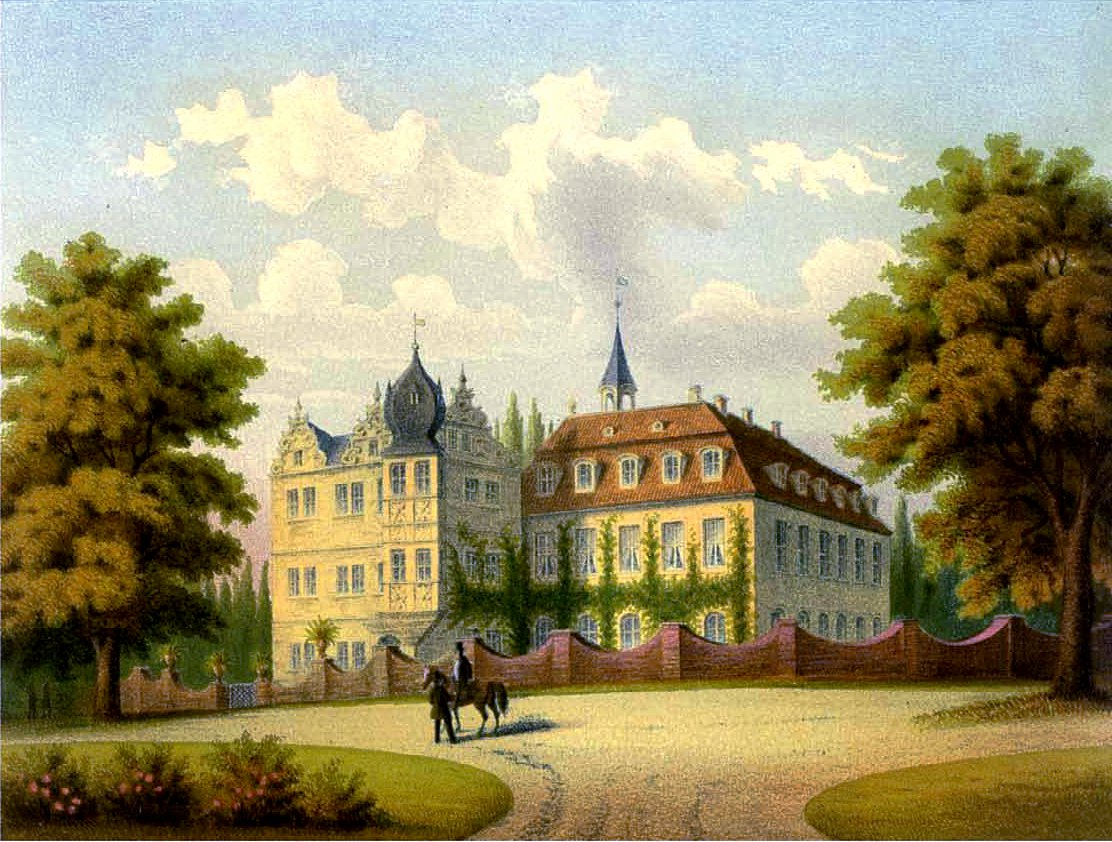 Wasserschloss Sankt Ulrich, Lithografie aus dem 19. Jahrhundert